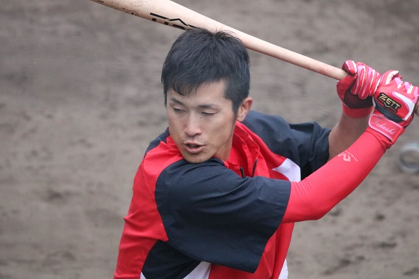 2017/11/7 天福球場